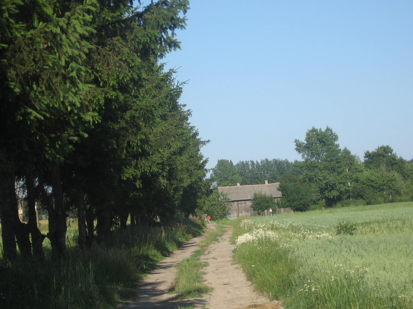 Drzewna aleja we wsi Gajewniki-Kolonia